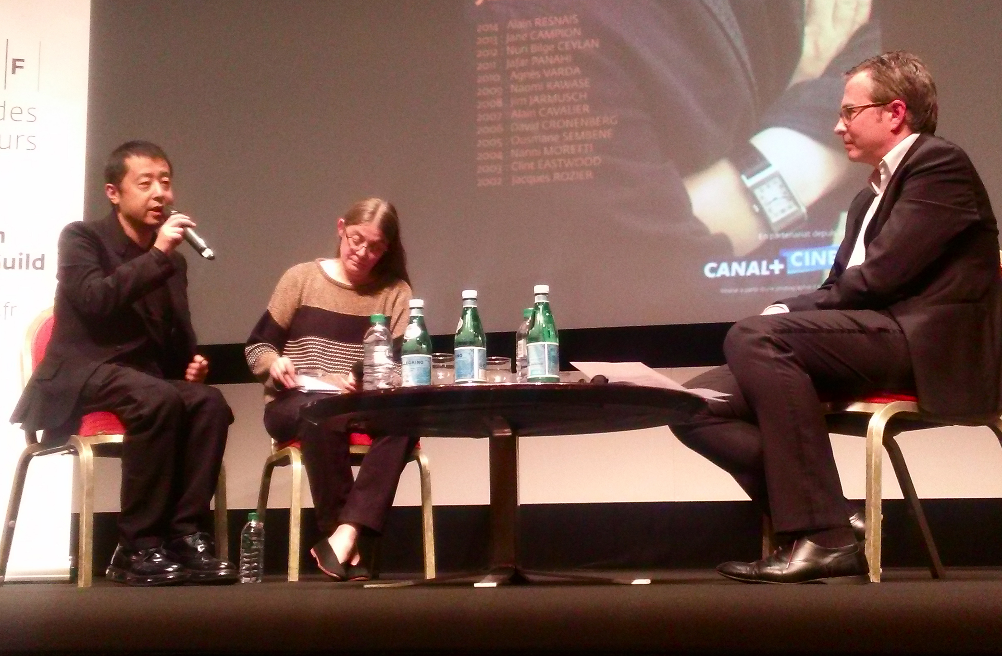 Rencontre avec Jia Zhangke présentée par Olivier Père (une traductrice au milieu) à la Quinzaine des réalisateurs 2015.